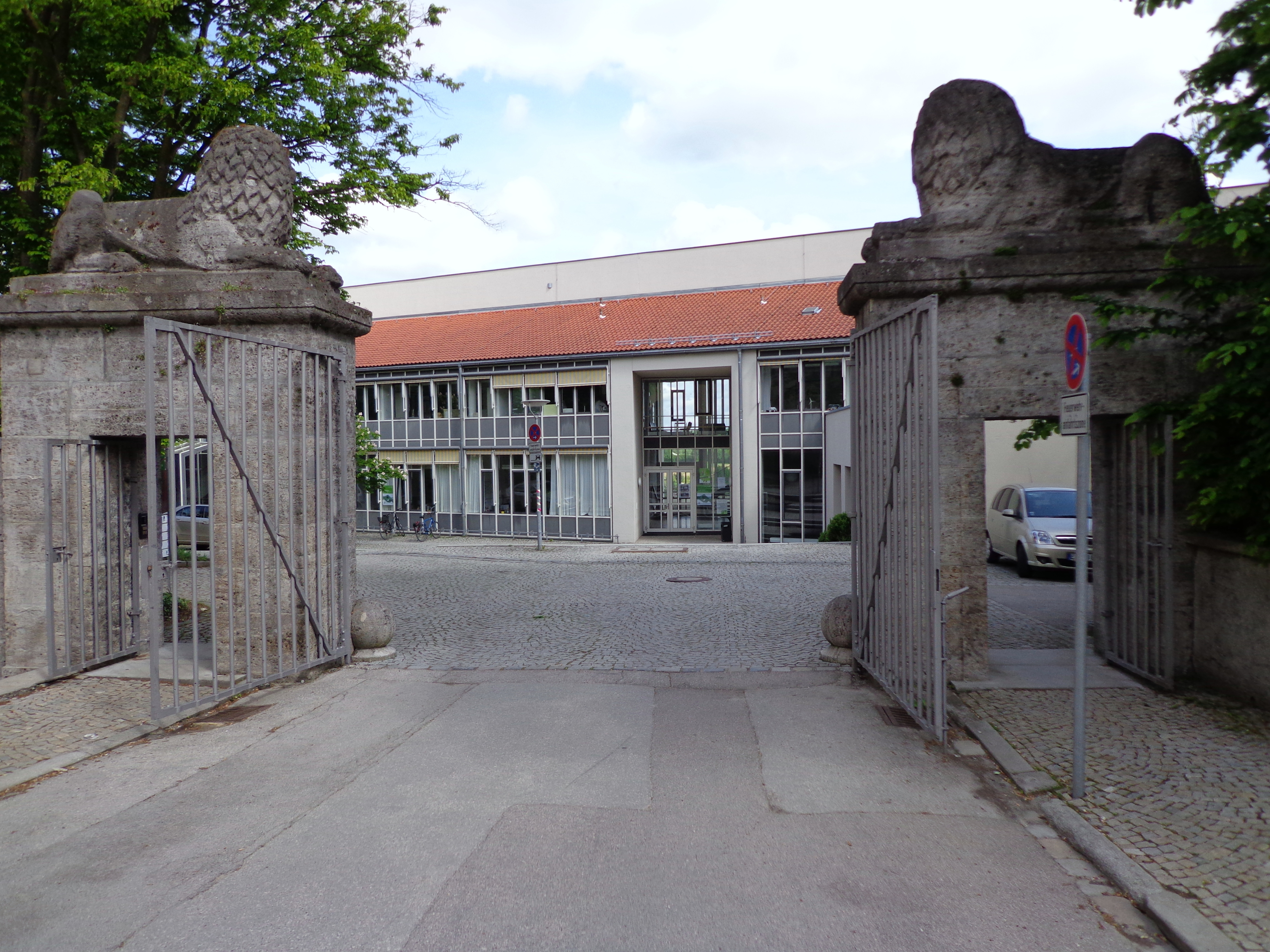 Durch das schon ein Jahrhundert alte Löwentor blickt man auf das moderne Gebäude der Hochschule Weihenstephan-Triesdorf.